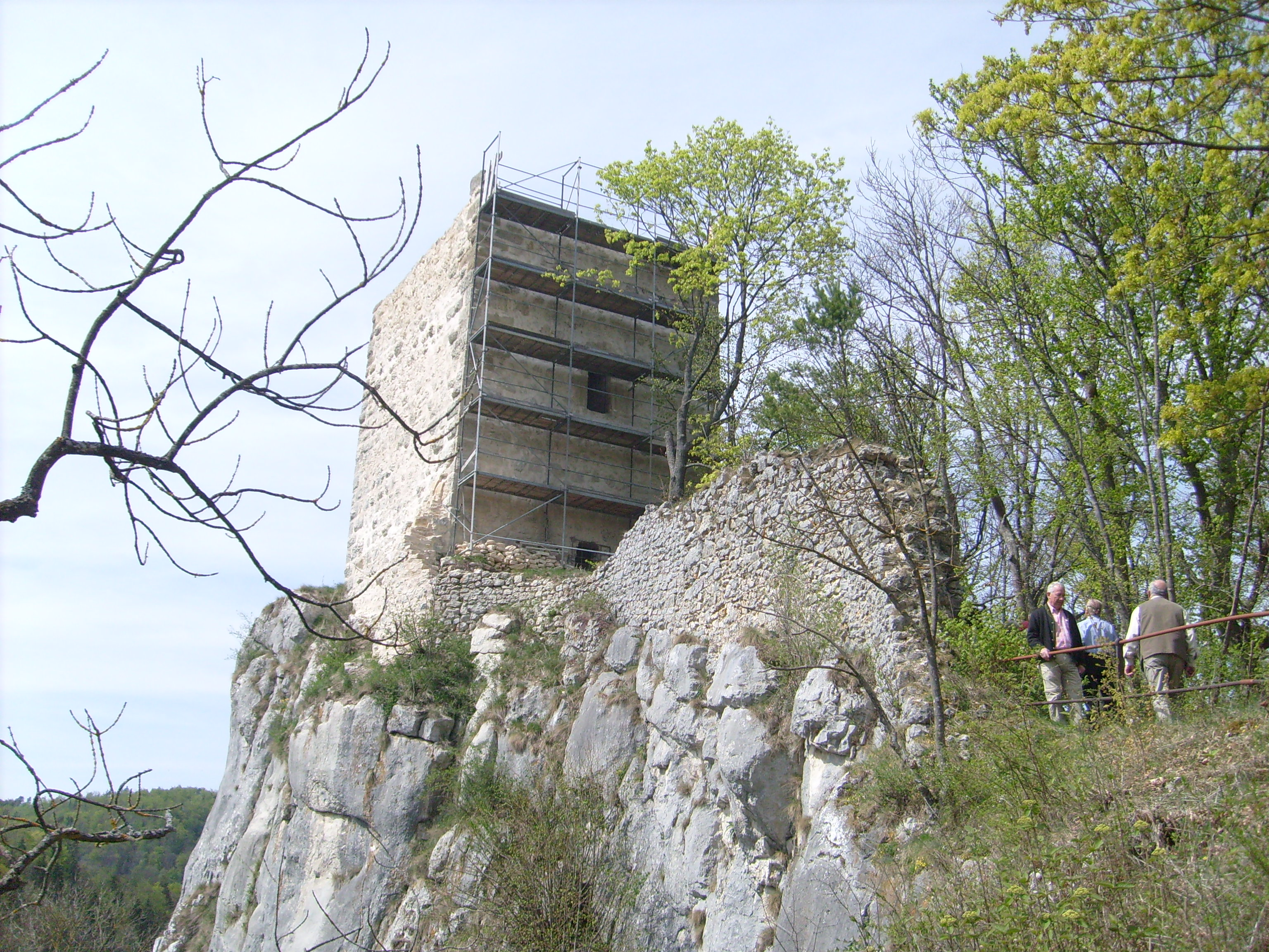 Ruine Dietfurt - Bergfried und Reste der Umfassungsmauer.